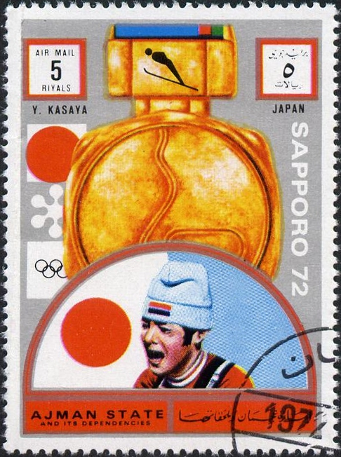 Yukio Kasaya